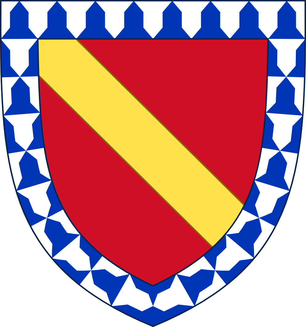 Armoiries de Gilbert Motier de La Fayette, compagnon de Jeanne d'Arc